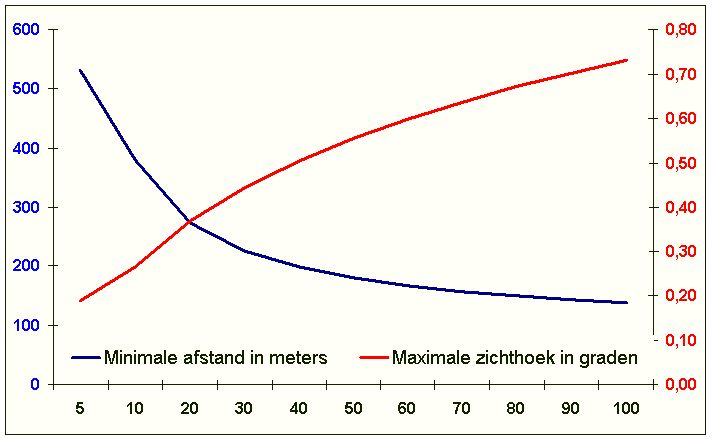 Grafiek van luchtspiegelingsgrenswaarden